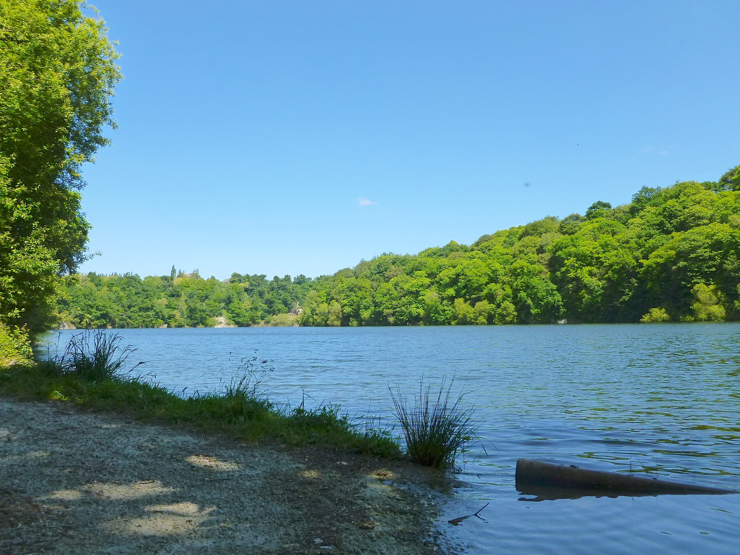 Photo du lac d'Arguenon prise depuis l'embarcadère de Pléven.